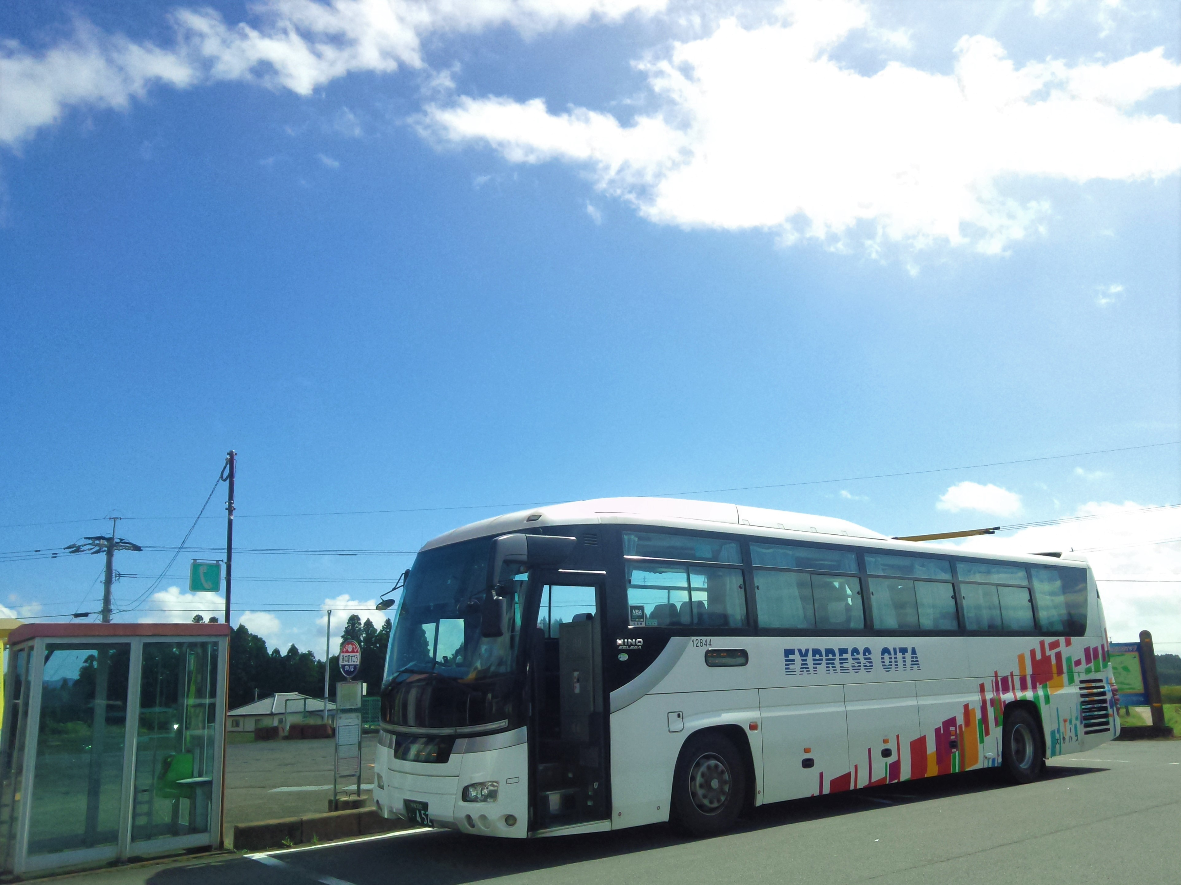 大分バスの日野セレガ、特急やまびこ号に使用される車番12844（大分200か452）